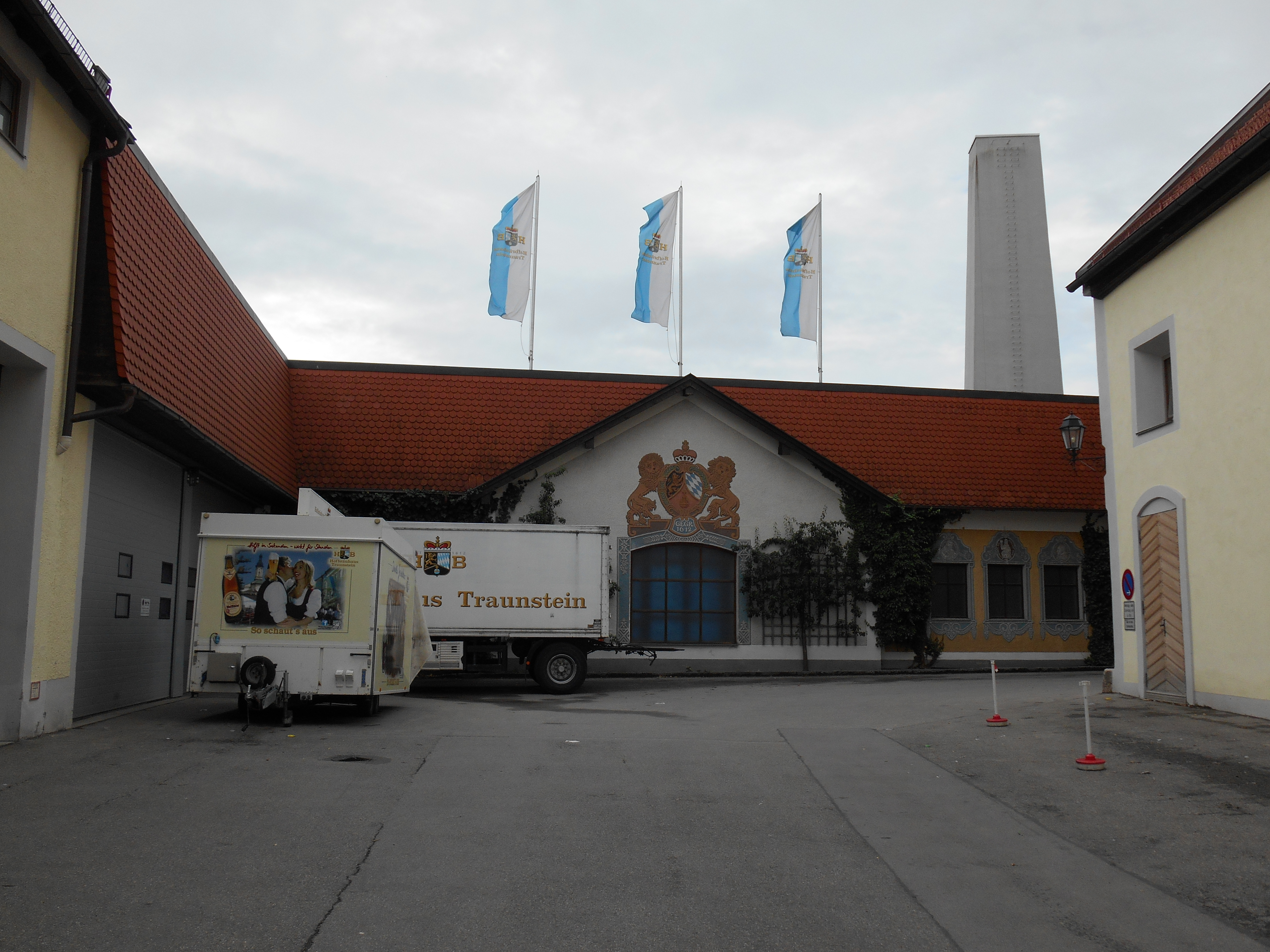 Aragonés: Hofbräuhaus Traunstein fabrica